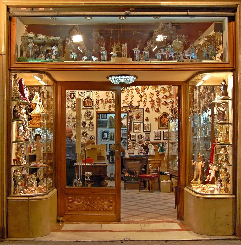 Tienda de artículos religiosos. Plaza del Salvador (Sevilla, España)